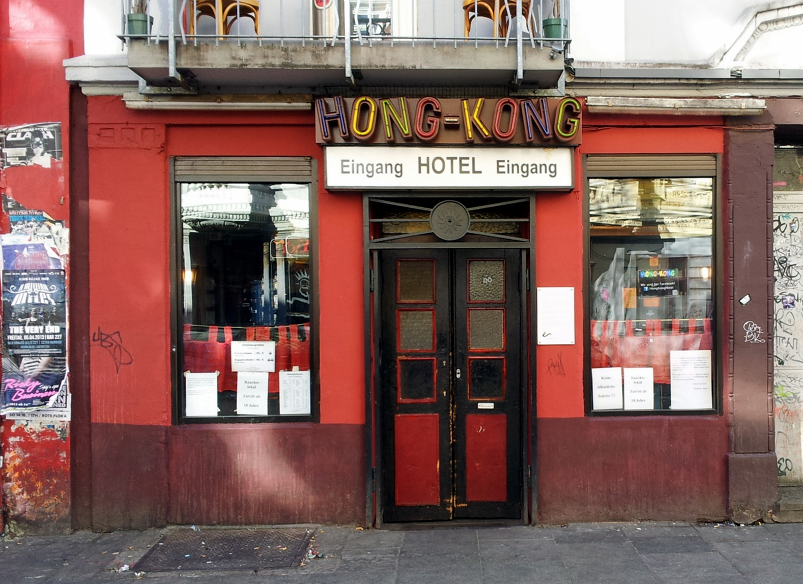 Eingang der Hongkong Bar, Hamburg St. Pauli, Hamburger Berg - Chinesenviertel Chinatown Hamburg